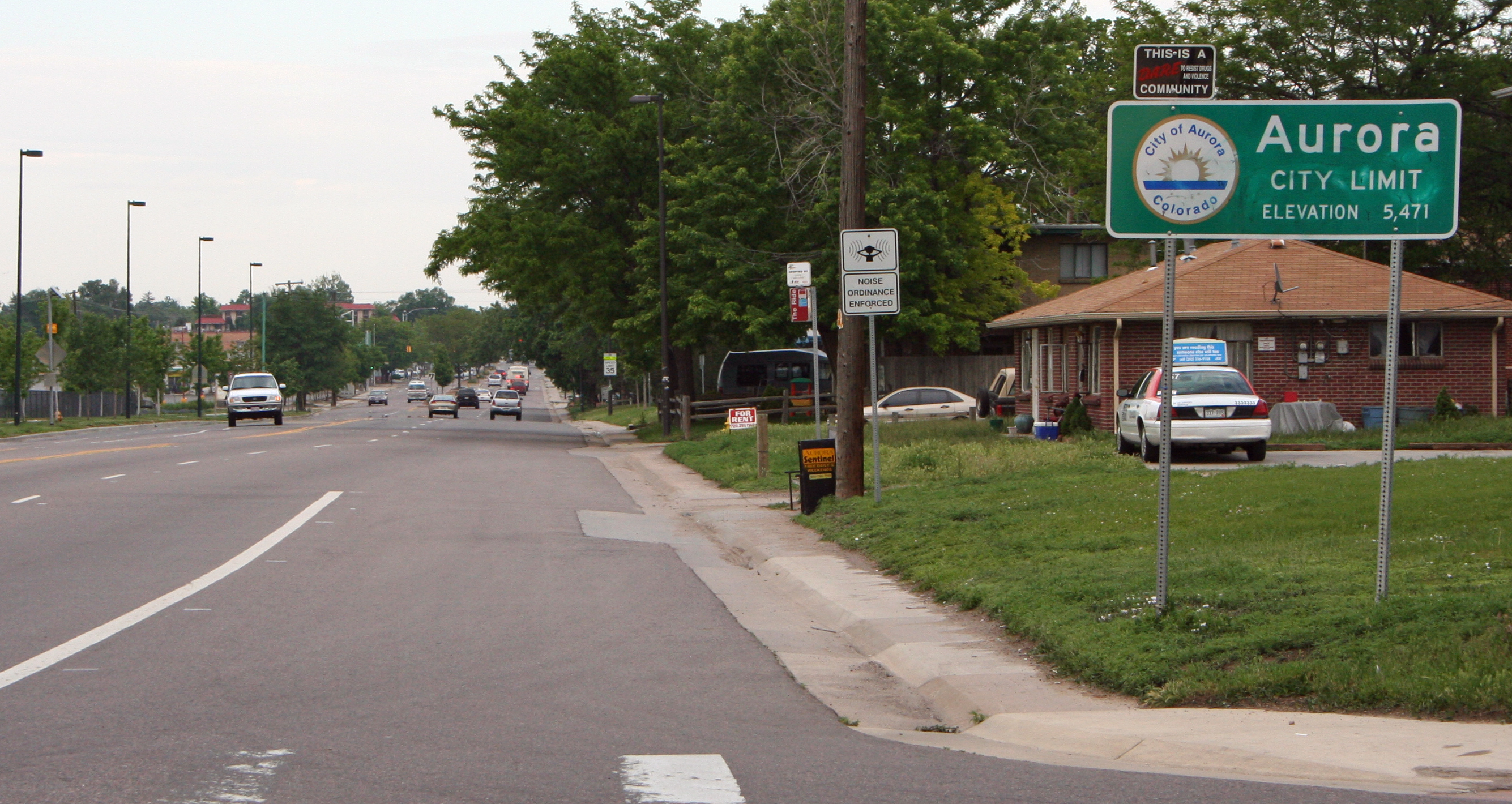 Aurora, Colorado